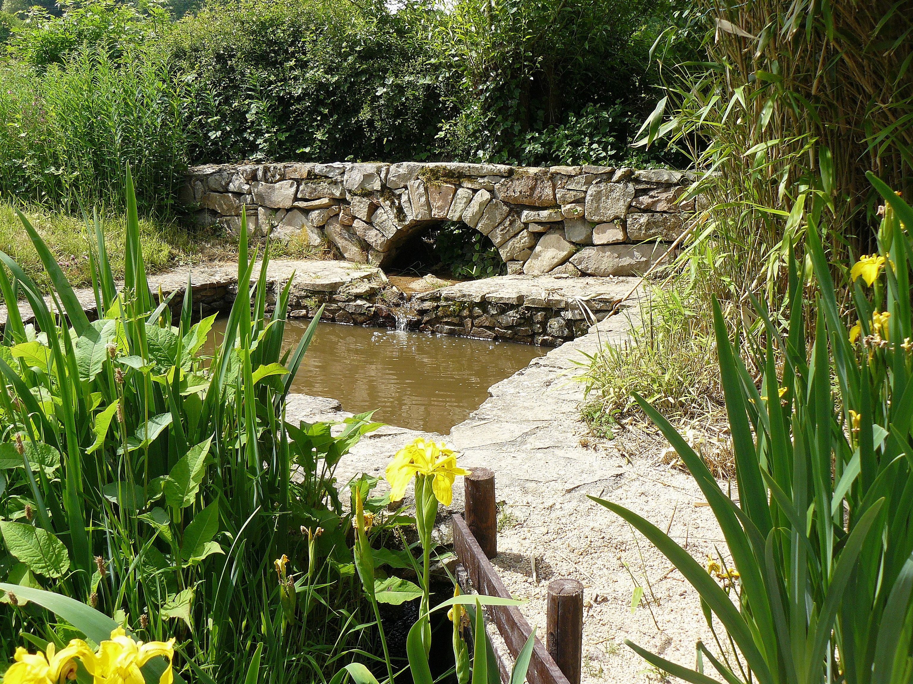 Lavoir restauré à La Celle-en-Morvan (Saône-et-Loire, France)